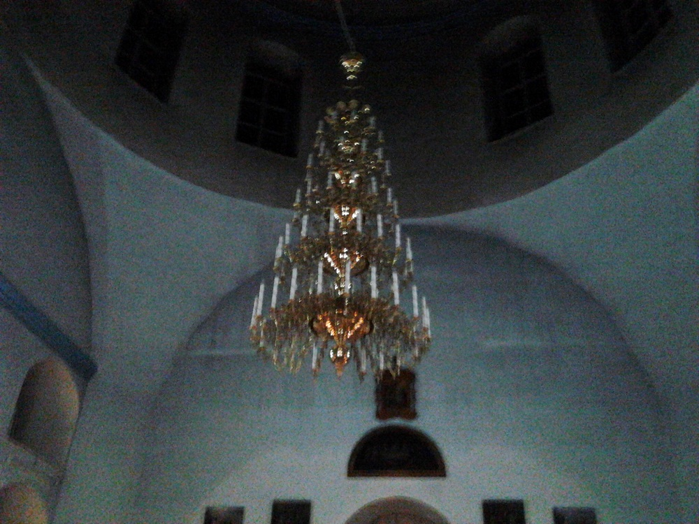 Нижняя Добринка (Жирновский район)